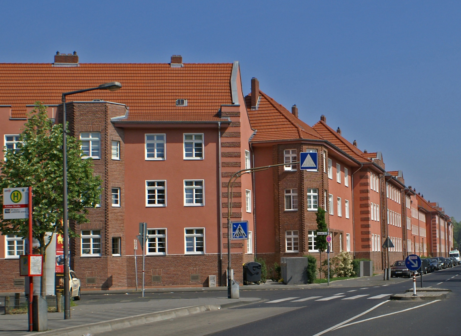 Köln-Höhenberg, sanierter Straßenzug an der Fuldaer Straße